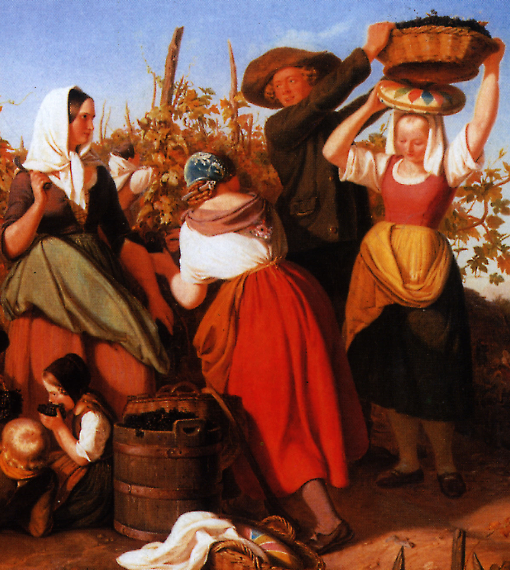 Bildausschnitt